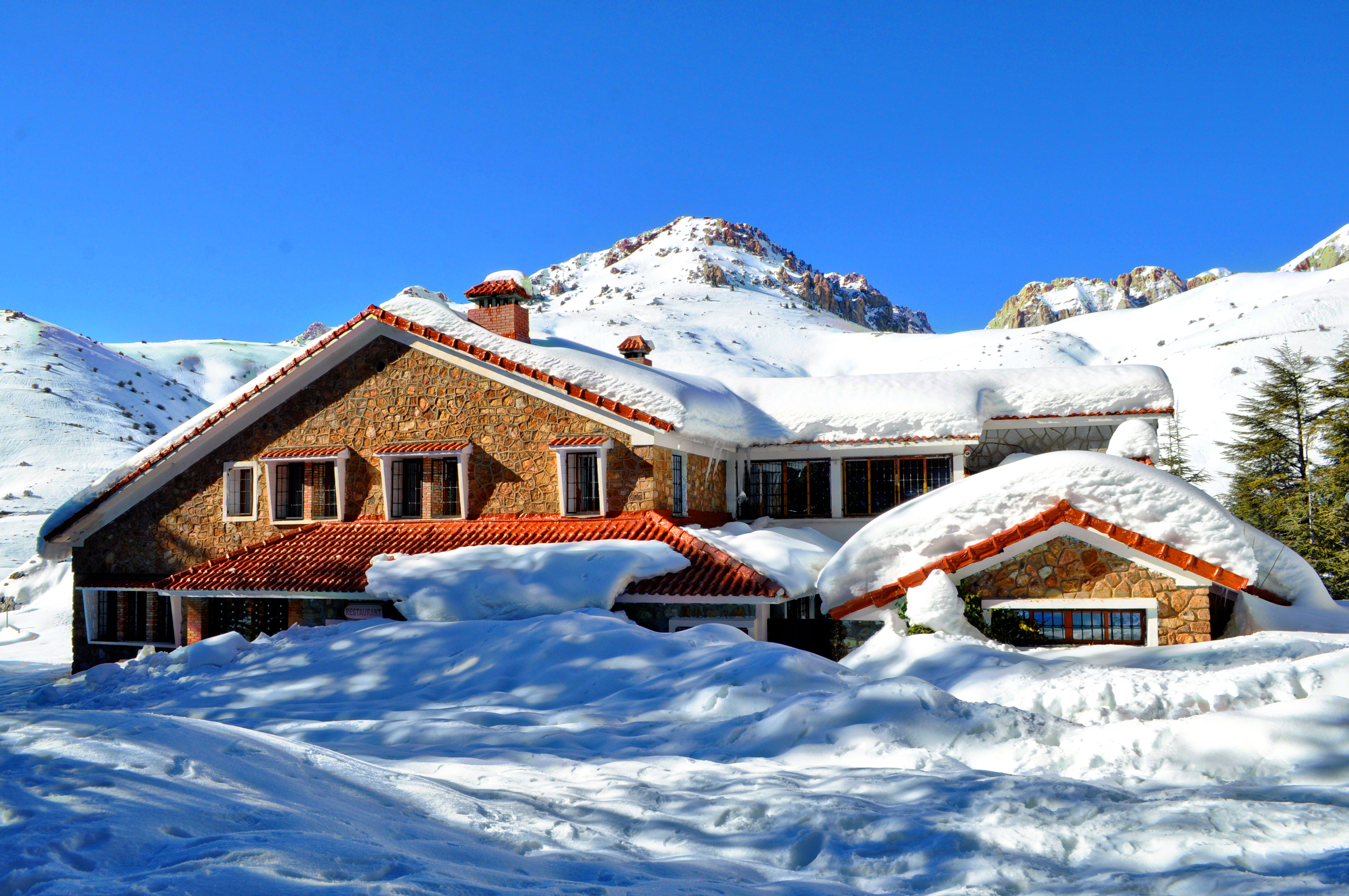 chalet du CAF TIKJDA